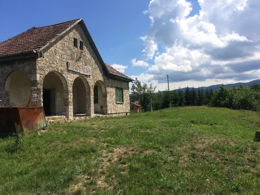 A megszűnt mikófalvi vasúti megálló